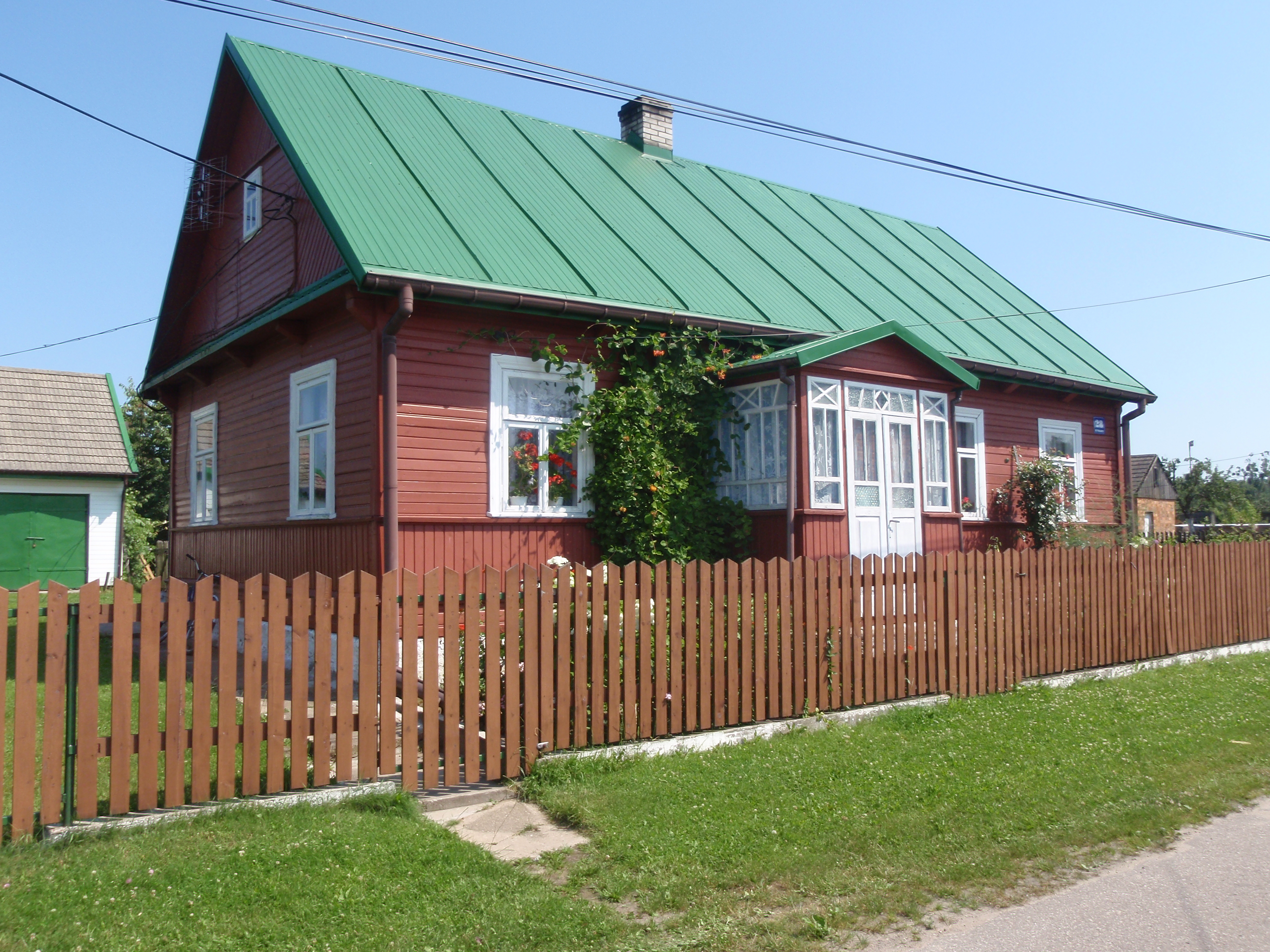 dom nr 28 w Rybakach